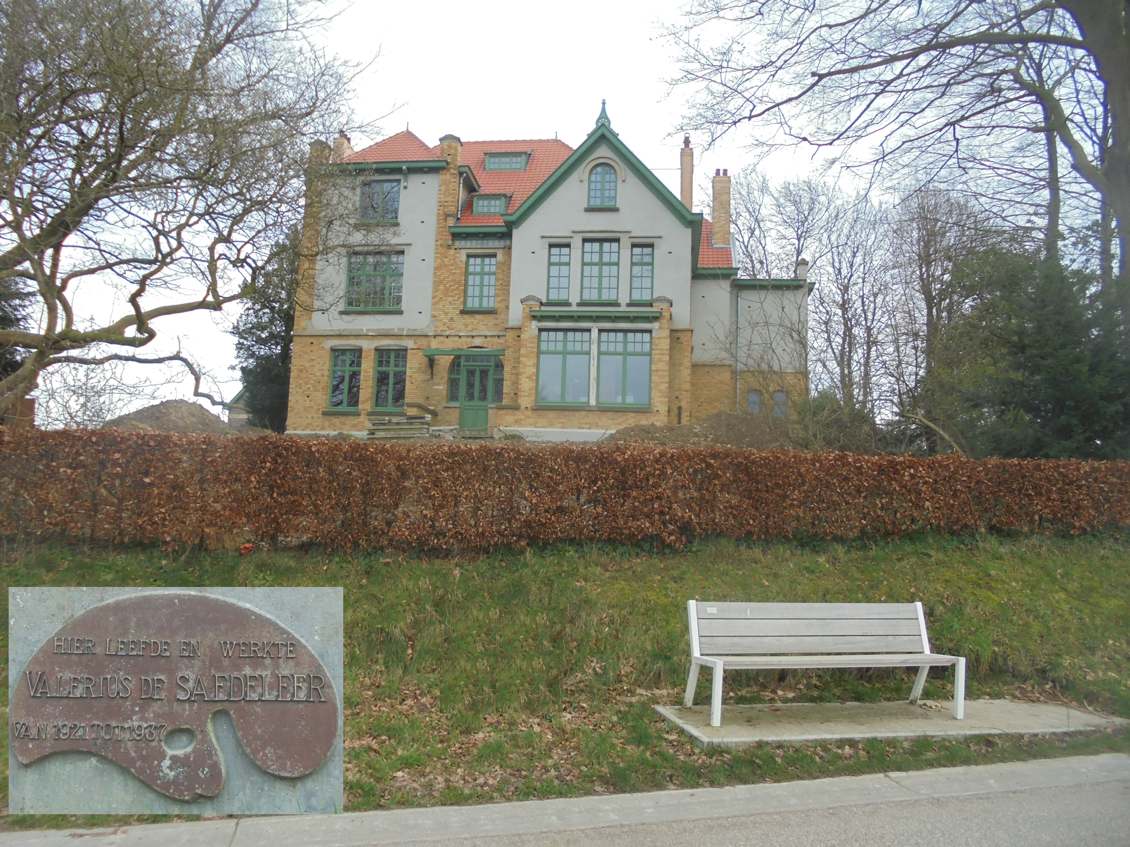 Villa Tynlon - Bossenaarstraat - Etikhove - Maarkedal - Oost-Vlaanderen - België